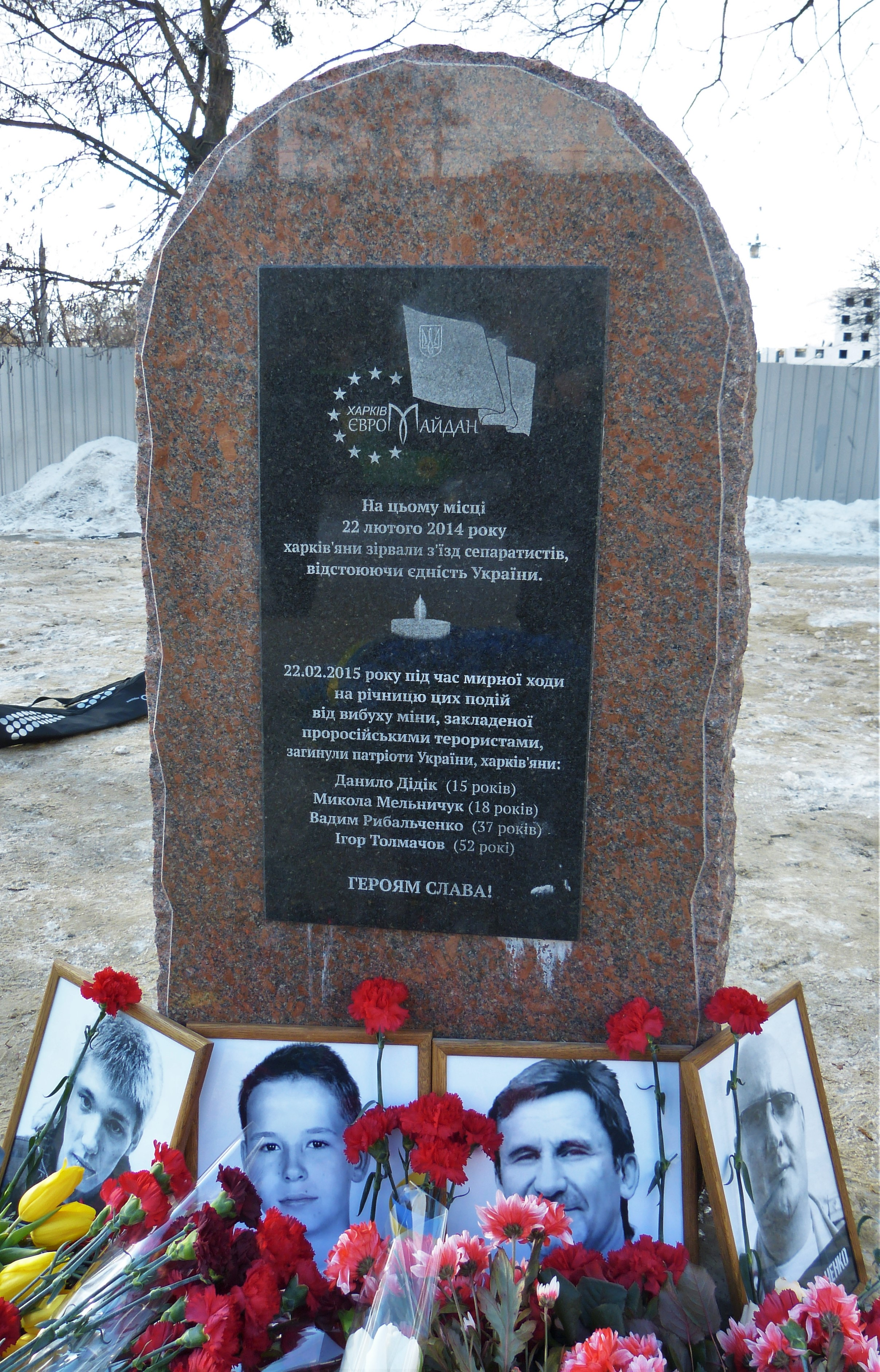 Пам'ятний камінь по загиблим від теракту 22 лютого 2015 року та на згадку подій 22 лютого 2014 року.